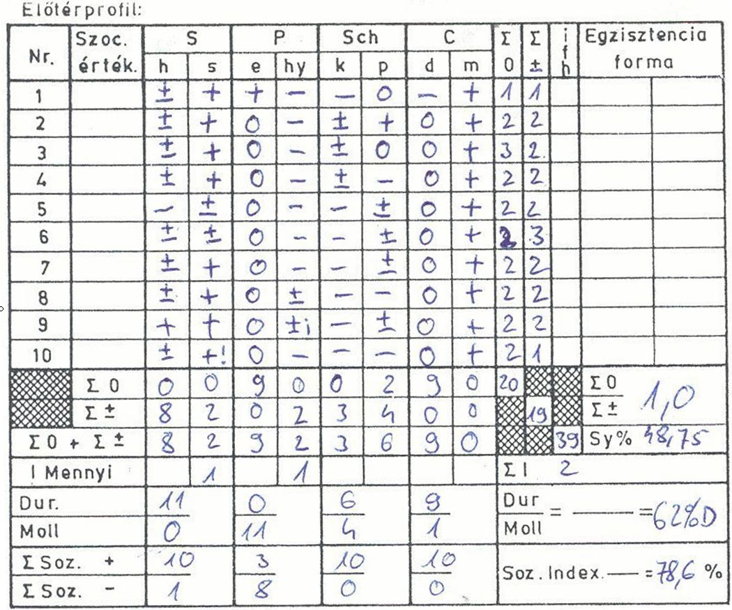 Szondi-teszt, saját tesztfelvétel, a vsz. engedélyével